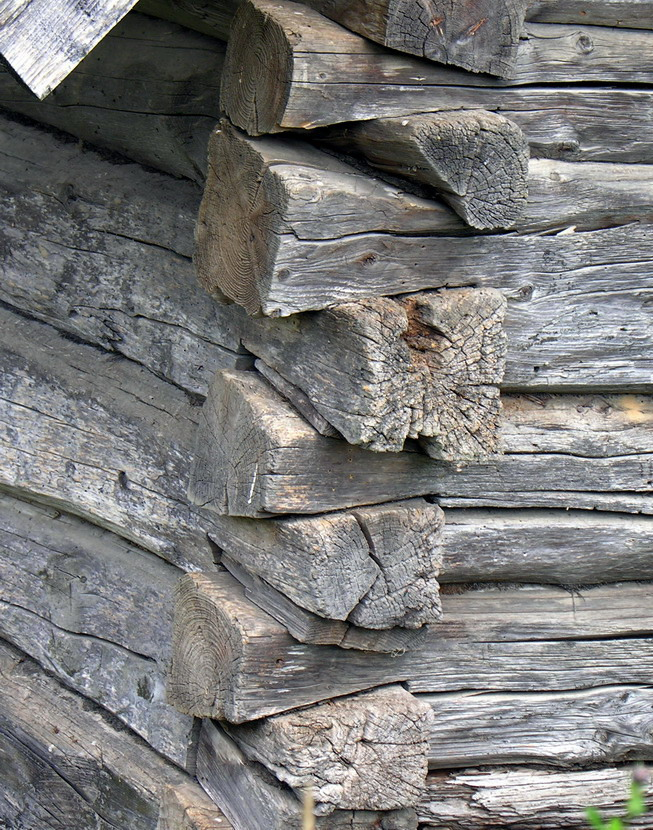 Sąspara 2006 m. rugpjūčio 20 d.